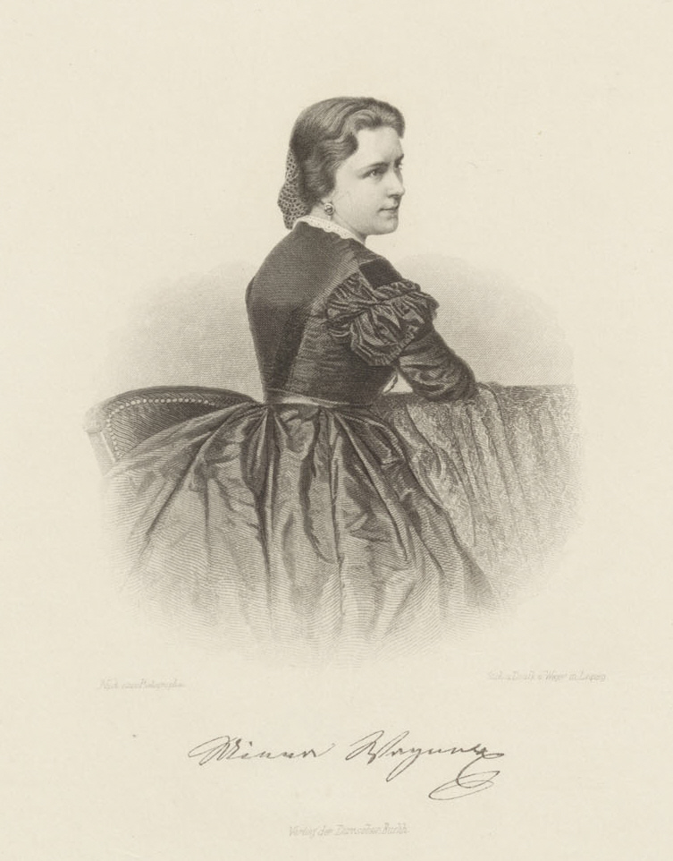 Minna Wagner (1840-1910), österreichische Schauspielerin, mit faksimilierter Unterschrift; Stahlstich; UB Tübingen